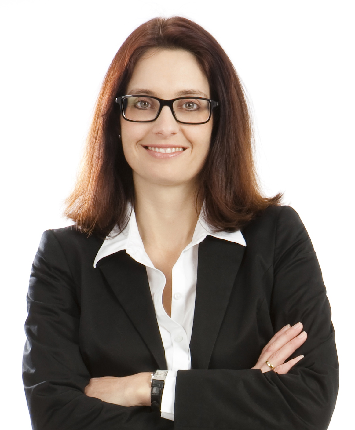 Vorarlberger NEOS-Landtagsabgeordnete Martina Pointner